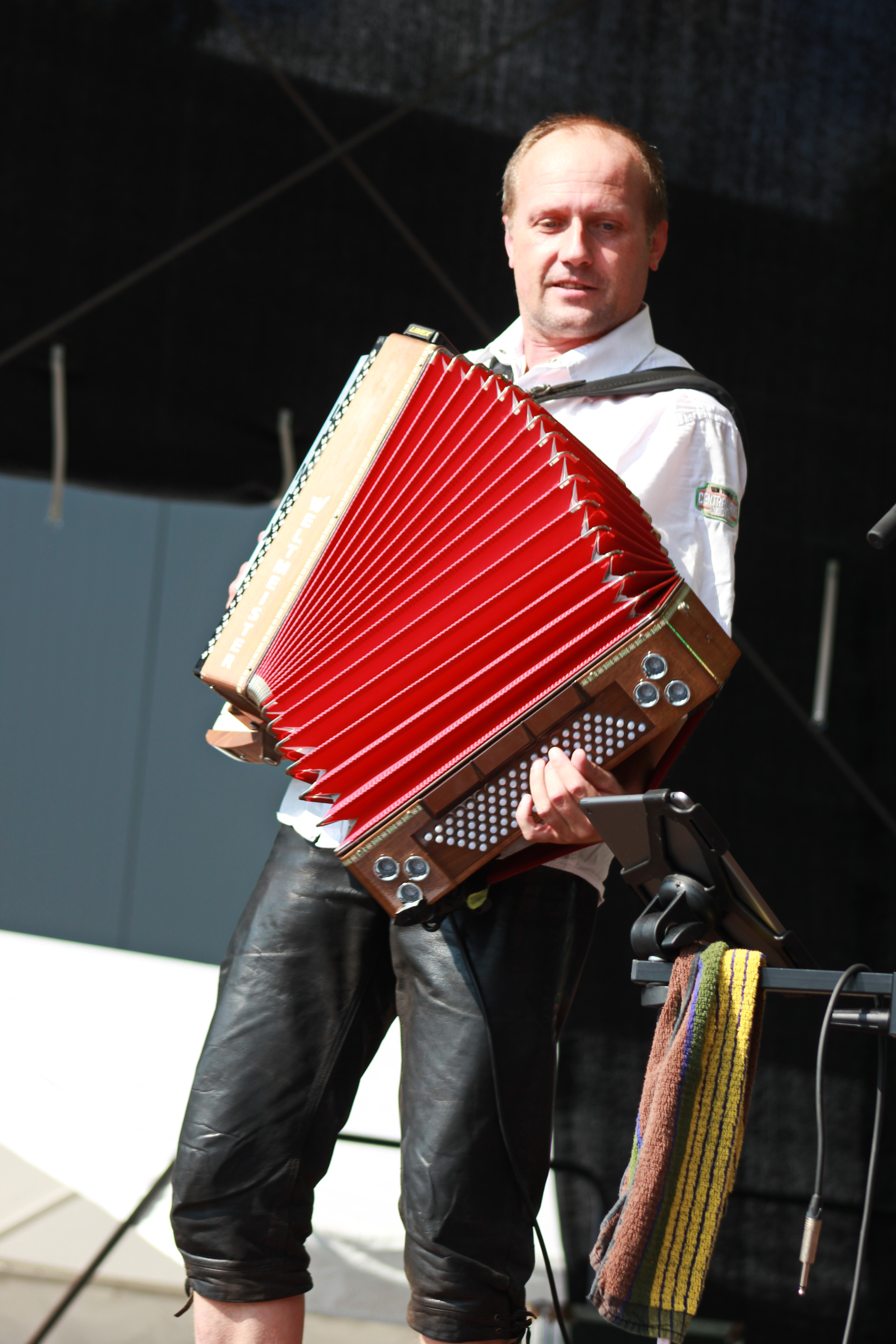 Aufgenommen bei einer Veranstaltung in Oelsnitz/Erzgebirge (Landesgartenschau 2015).